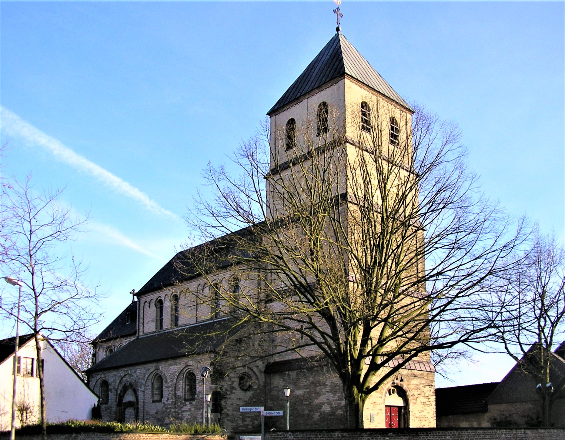 St. Dionysius zu Duisburg-Mündelheim